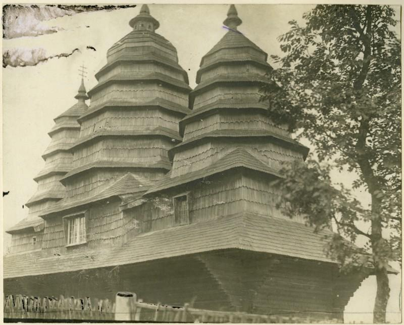 Церква Собору Пресвятої Богородиці в селі Маткові Турківського району.